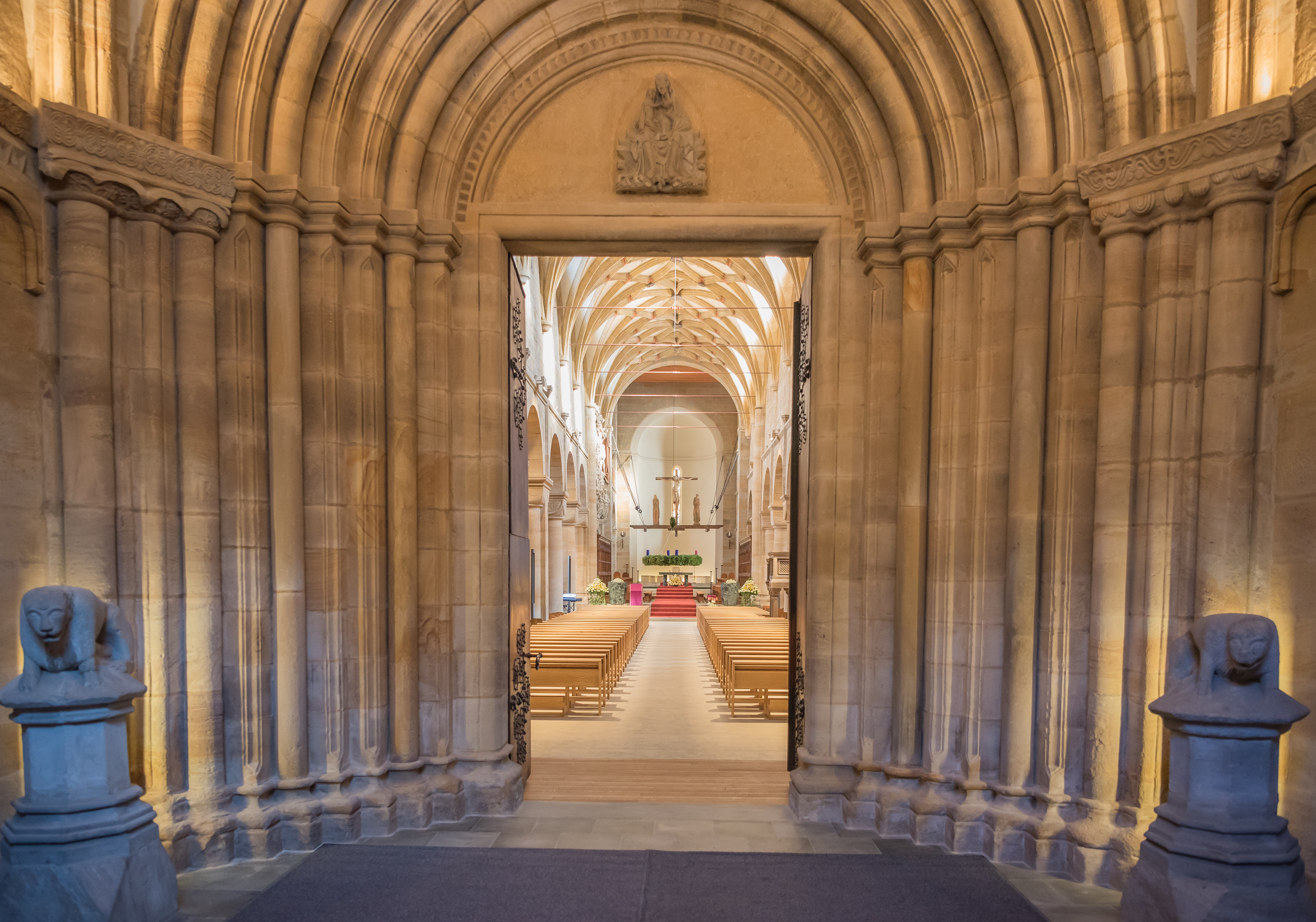 © Michael Regner